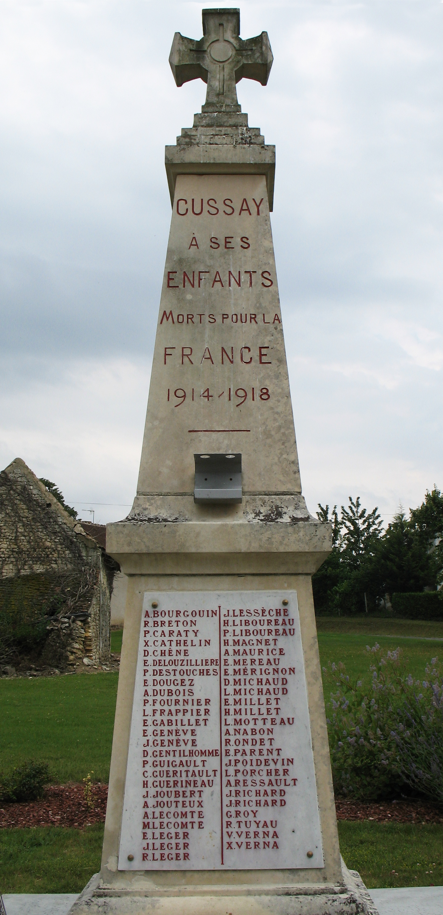 Monument aux morts de Cussay, Indre-et-Loire, France. Soldats tués durant la première guerre mondiale (1914-1918).